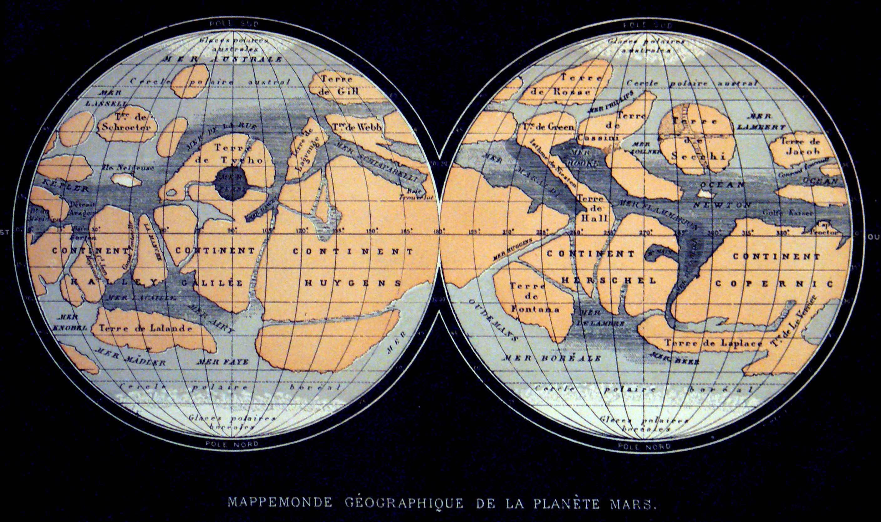 Carte de la planète Mars dessinée par l'astronome français Camille Flammarion parue dans l'ouvrage Terres du Ciel. (1884)